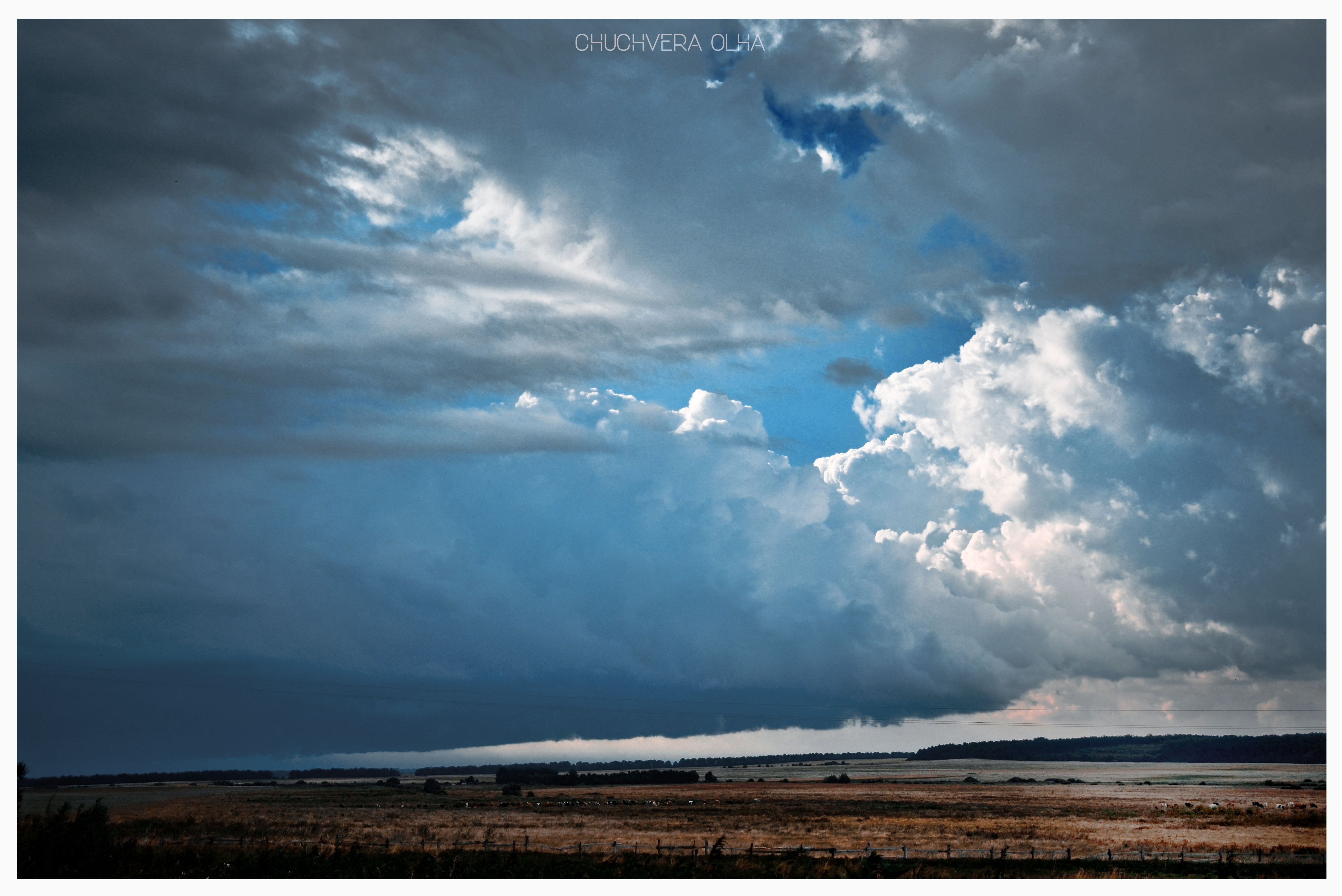 Поле Вербка, Летичівський район